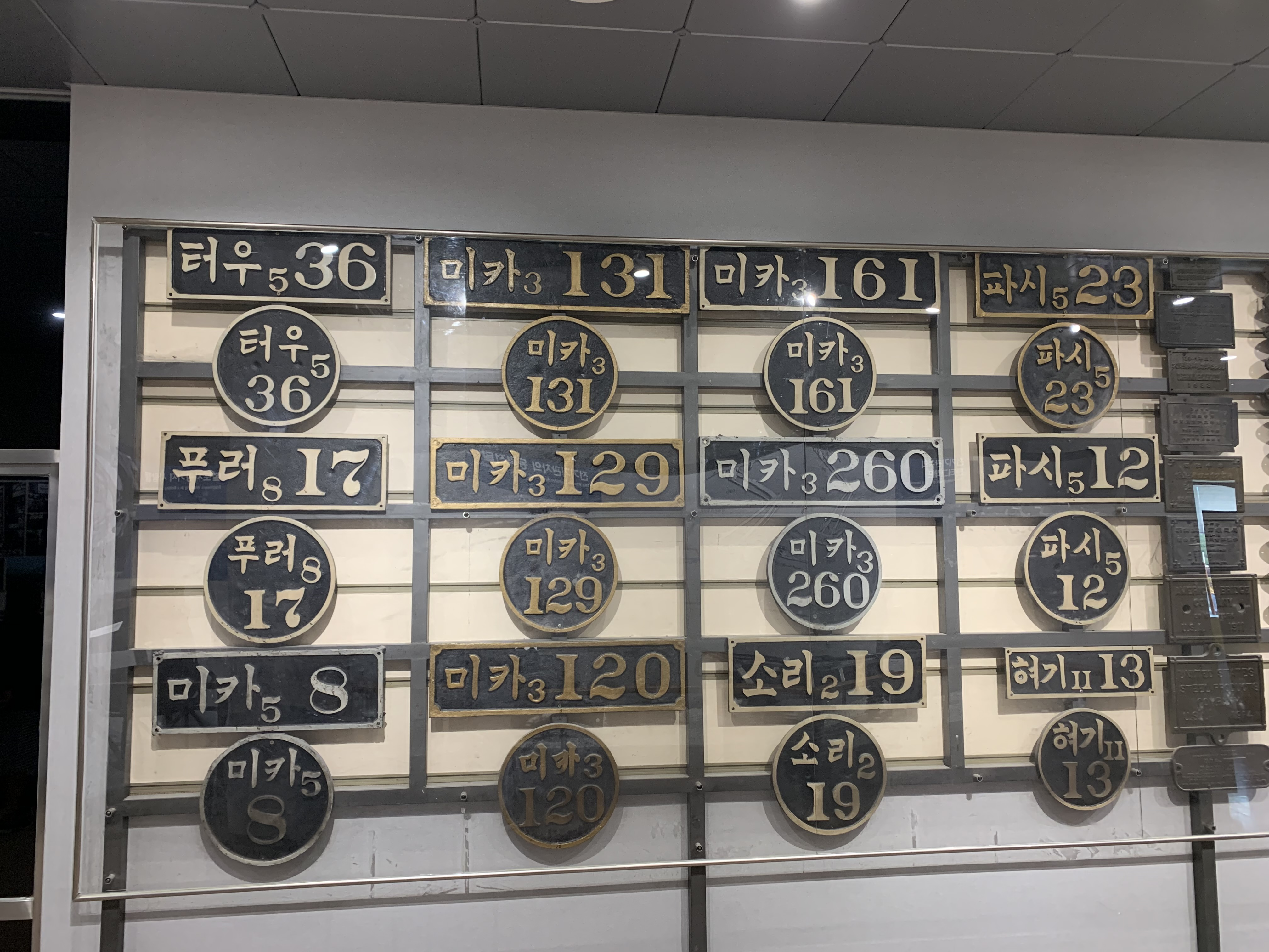 철도박물관의 증기기관차 명판